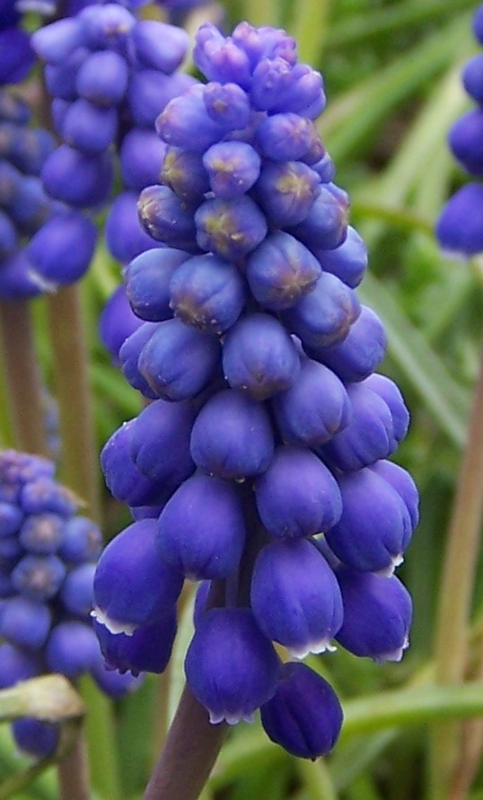 Muscari armeniacum (pl. szafirek armeński)